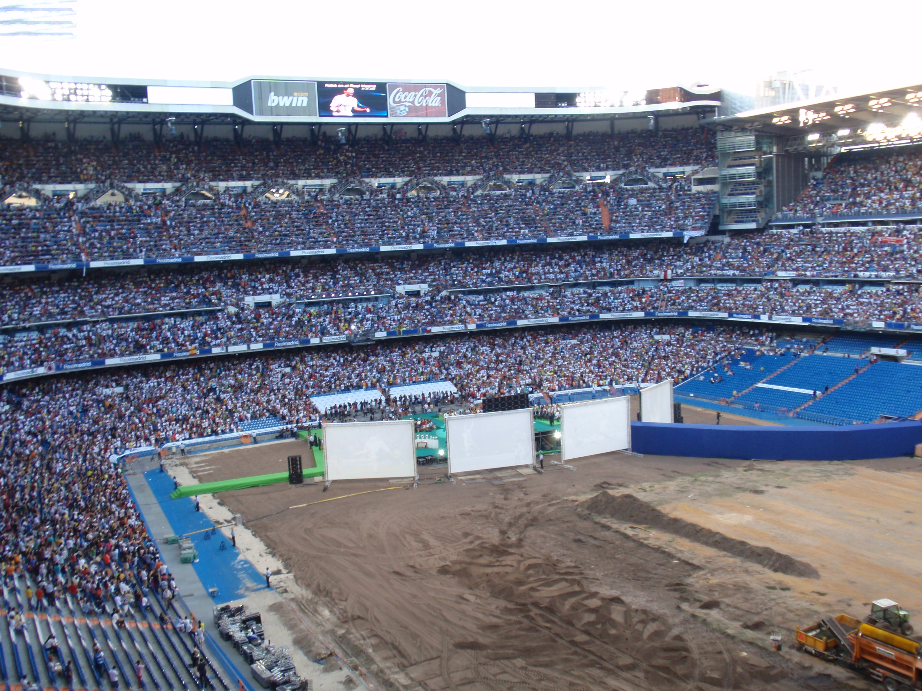 Increíble aspecto de las gradas del Santiago Bernabéu durante la presentación de Kaká como nuevo jugador del Real Madrid. Fuimos más de 50.000 personas los que casi llenamos el estadio en dicho evento.